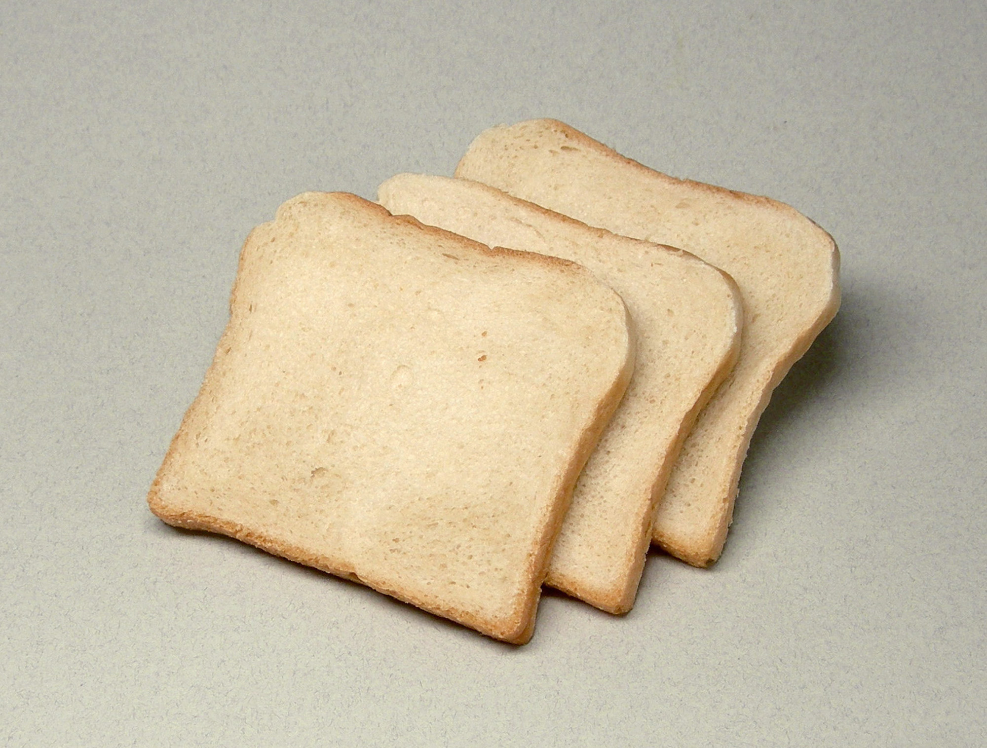 Toastbrot. Eigene Aufnahme. Hat biologisches Lockerung Schmeckt sehr lecker.